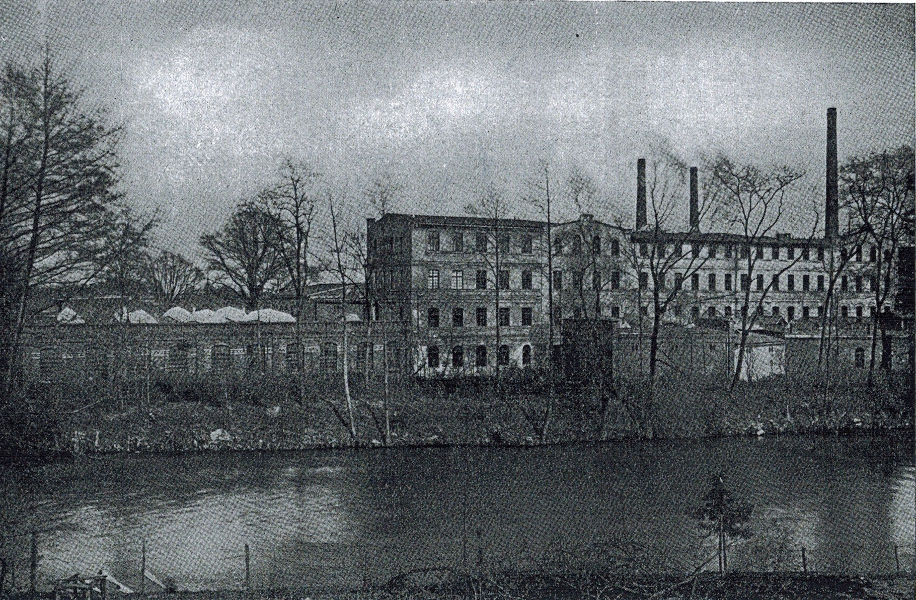 Fabrik Jäger, früher